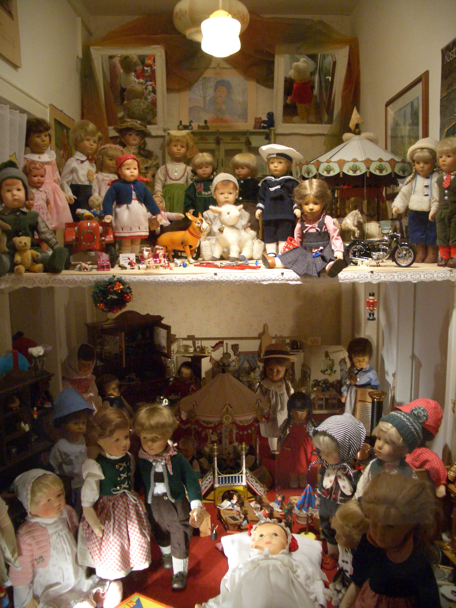 Museum Boxenstop, Tübingen Puppen